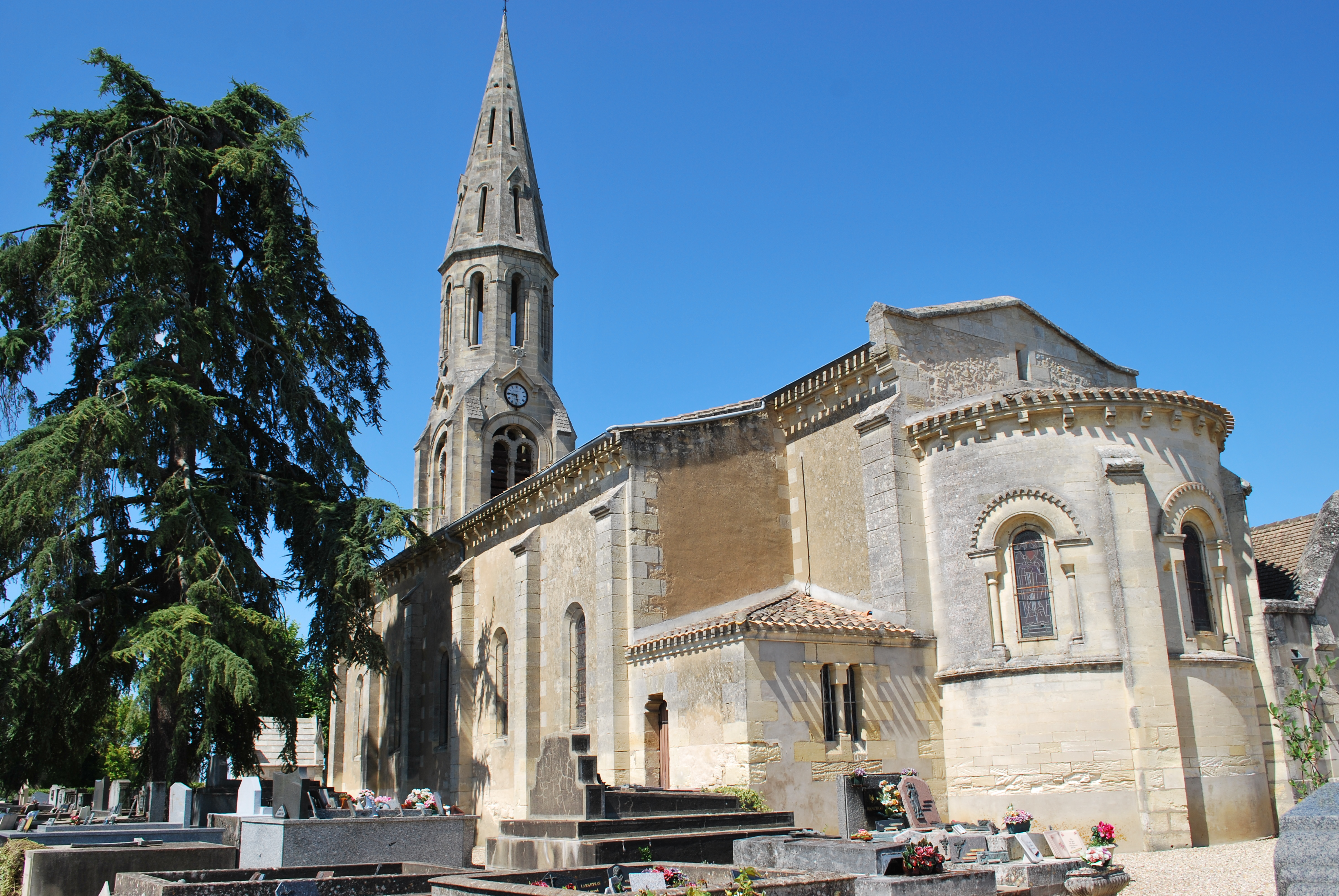 Néac église St Brice